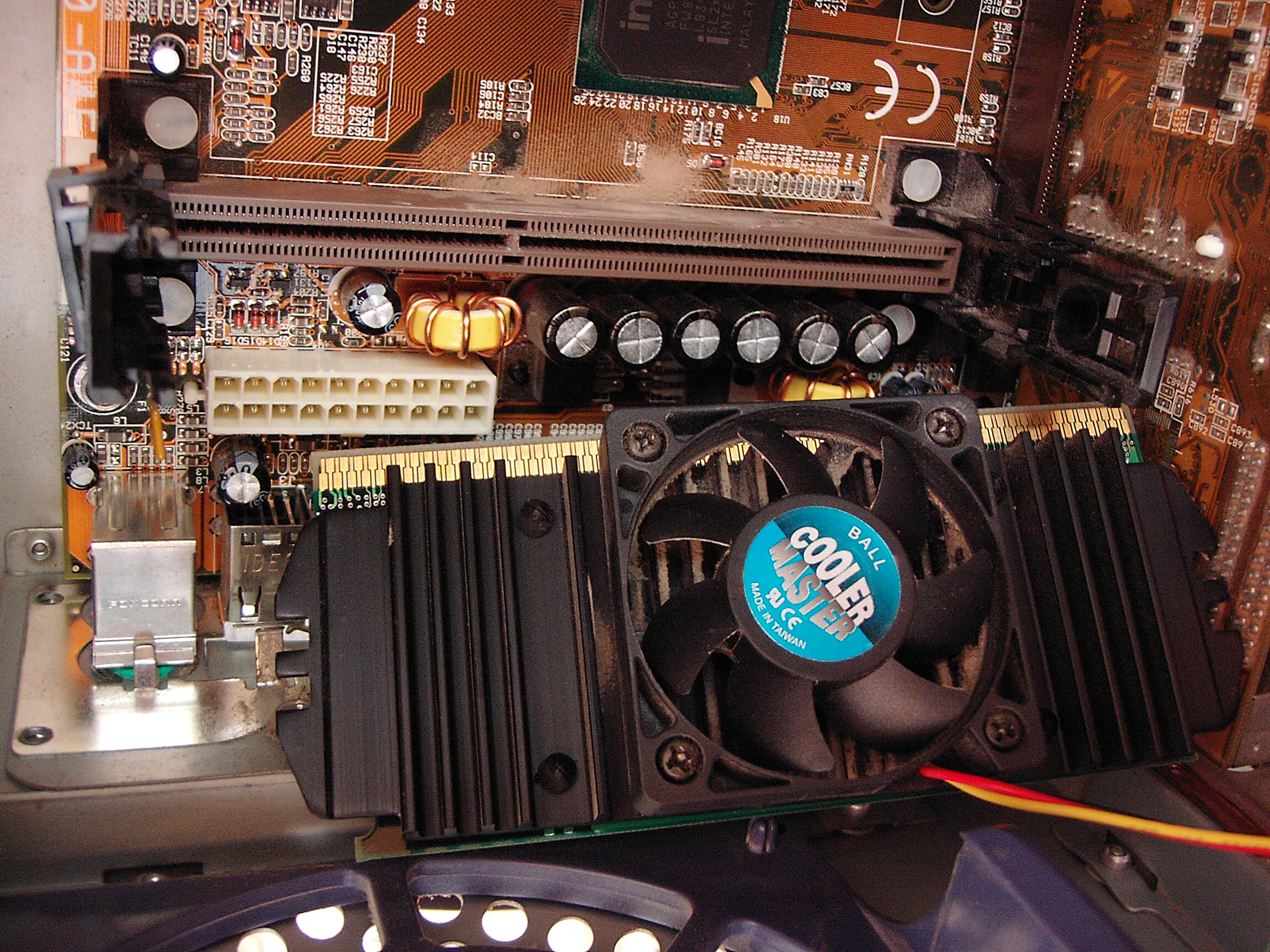 Placa base en la que se ve el conector Slot 1, y al lado, un procesador Celeron (300 Mhz) con disipador y ventilador. También se puede ver el conector de corriente. El autor de la foto soy yo, y la pongo en dominio público.